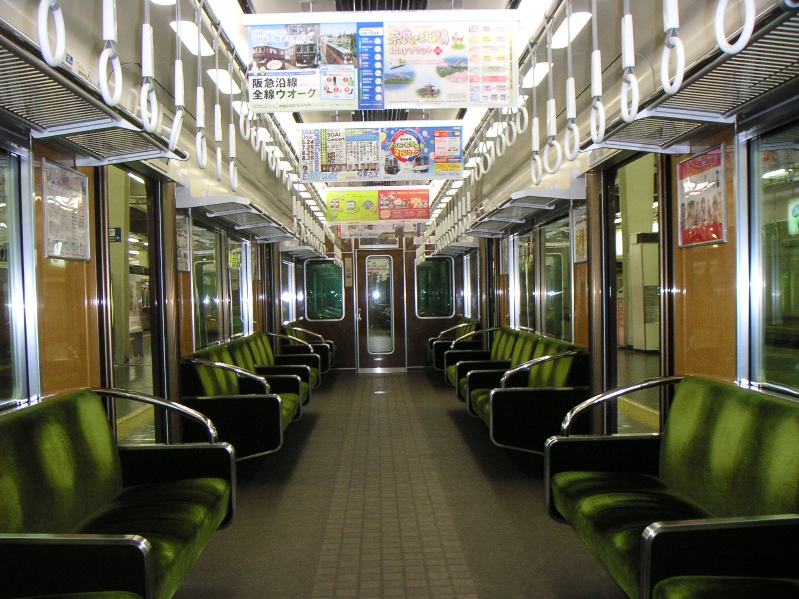 阪急9000系内装